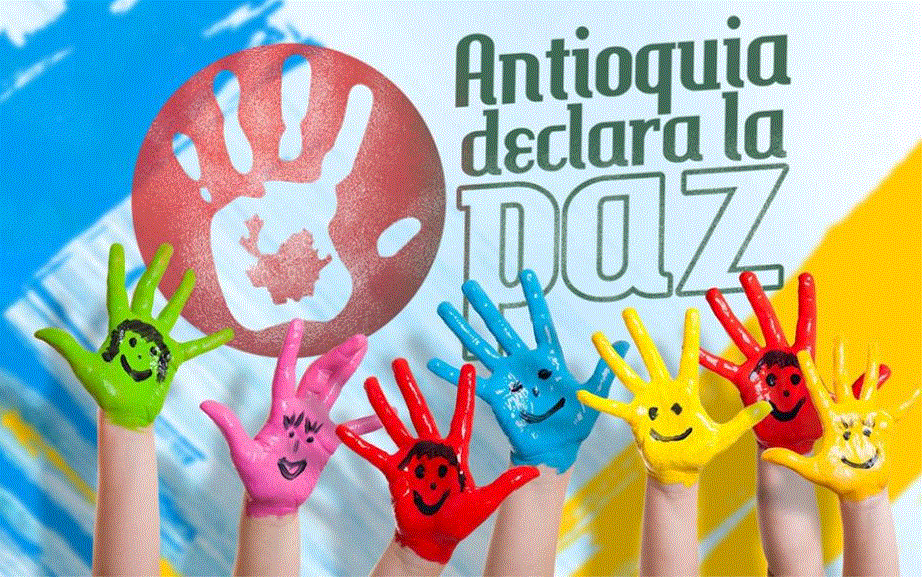 Oscar Hurtado - Unidad Liberal - Antioquia Declara la Paz - Aburra Norte - Marleny Arroyave 4 - 2017 2018 2021